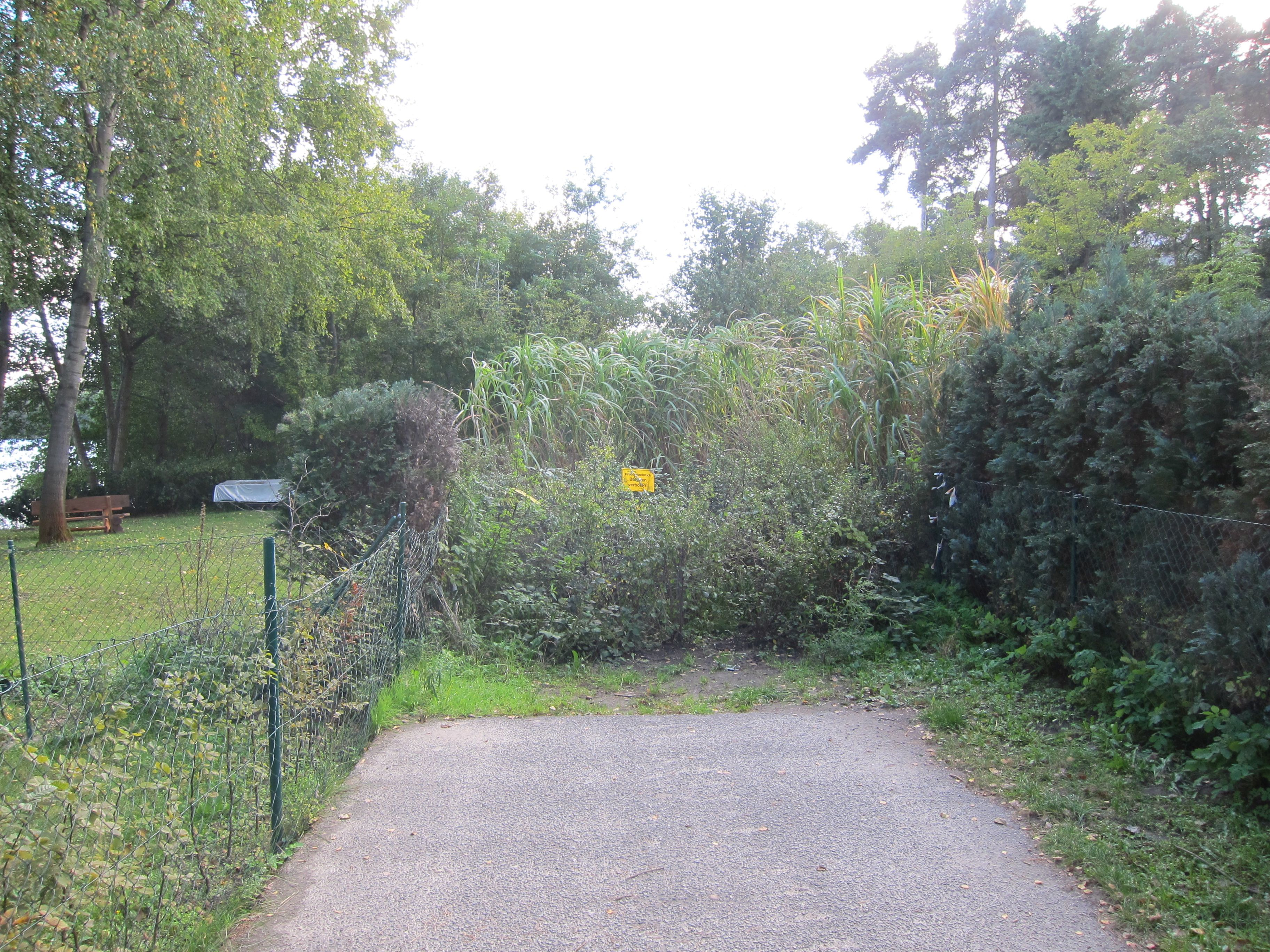 Durch Anwohner gesperrt Berliner Mauerweg am Groß-Glienicker See